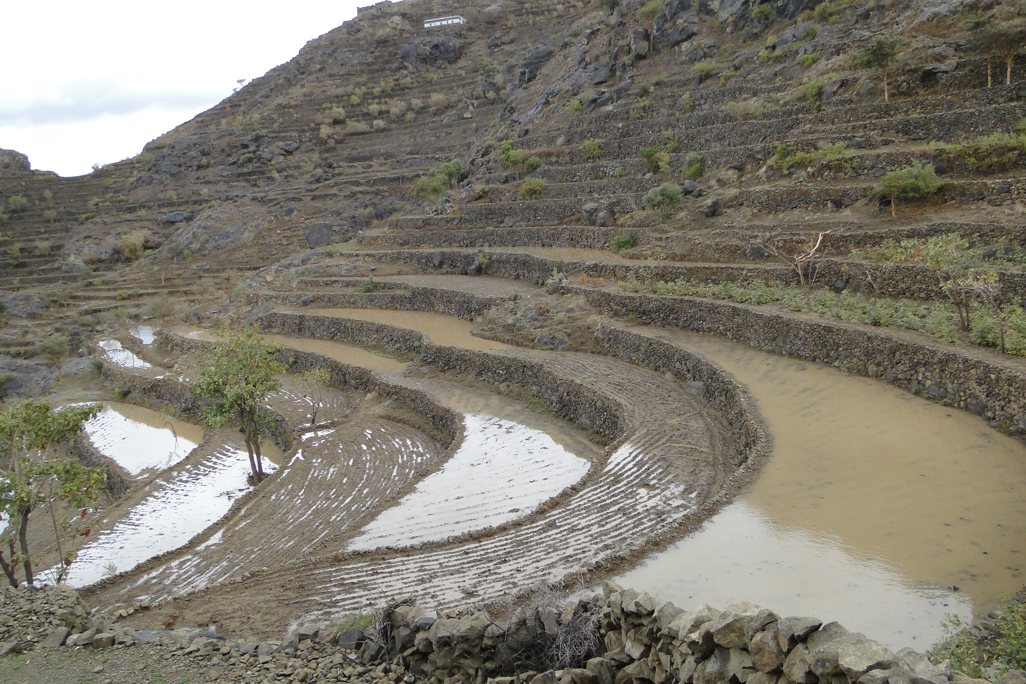 مدرجات زراعية بعد الامطار ريمه بني الضبيبي بني هتار .اليرم جوار منزل بكر الهتاري